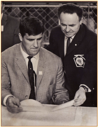 Na Akademickém MS 1966 (vpravo rozhodčí Karel Zrůbek, 7. DAN)